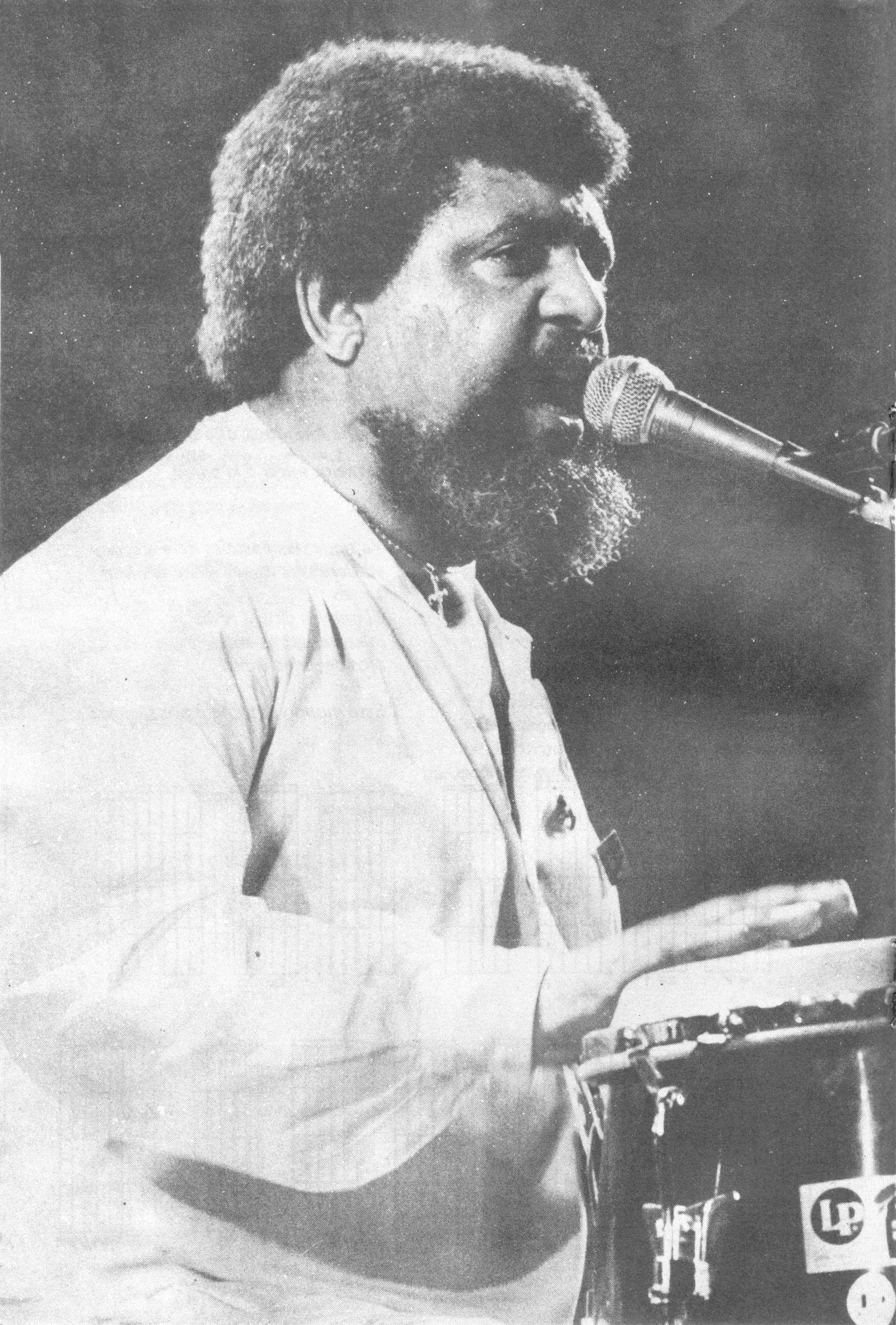 Fotografía del cantante uruguayo Rubén Rada, tomada en Argentina para la revista "Canta Rock", año 1 nº10 de 1984.